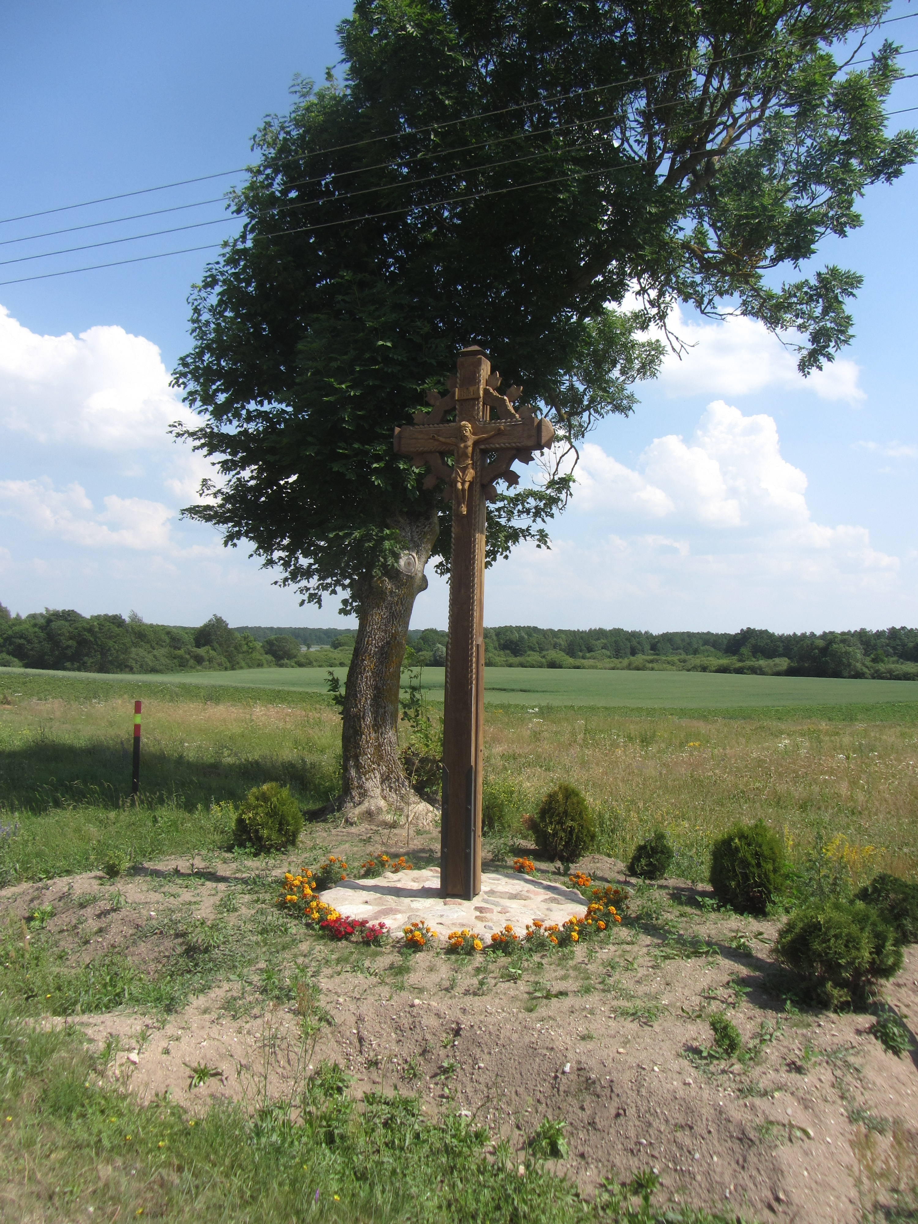 Teizų sen., Lithuania